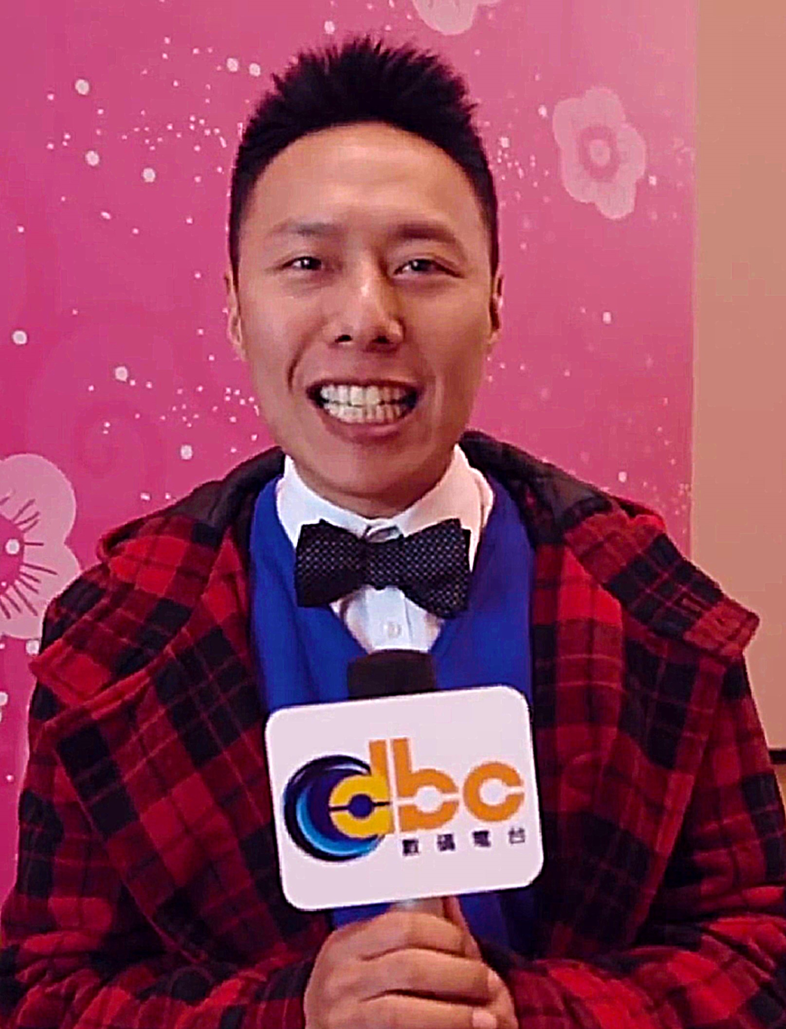 中文（香港）: 香港男演員及節目主持，曾為亞洲電視和漢傳媒旗下藝人